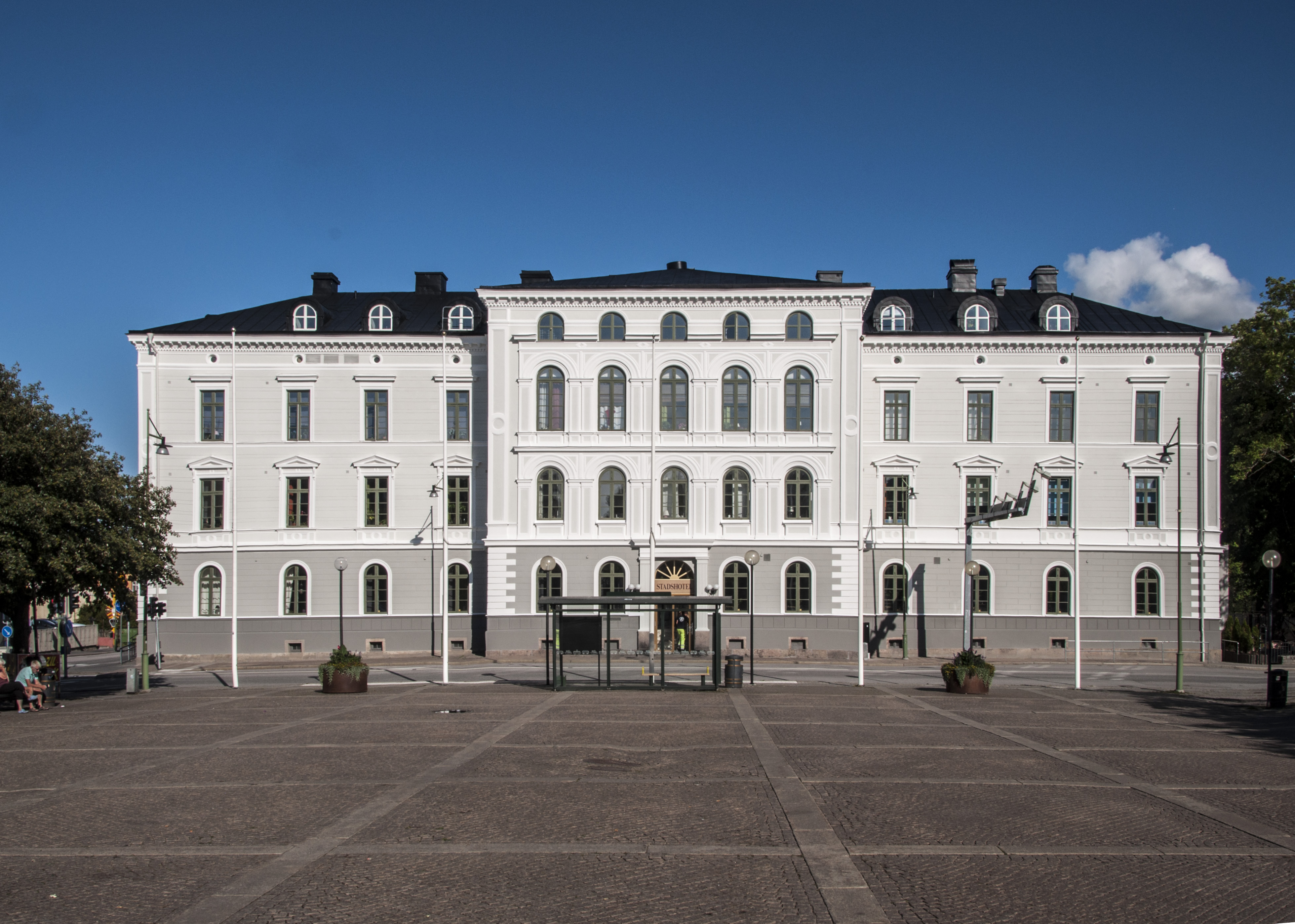 Mariestads stadshotell vid Nya Torget i Mariestad. Invigt 1866. Arkitekt Fredrik Wilhelm Scholander.(Källa:Mariestads stadsarkiv Drätselkammaren, volym F7: 4) Senare ut- och ombyggt.